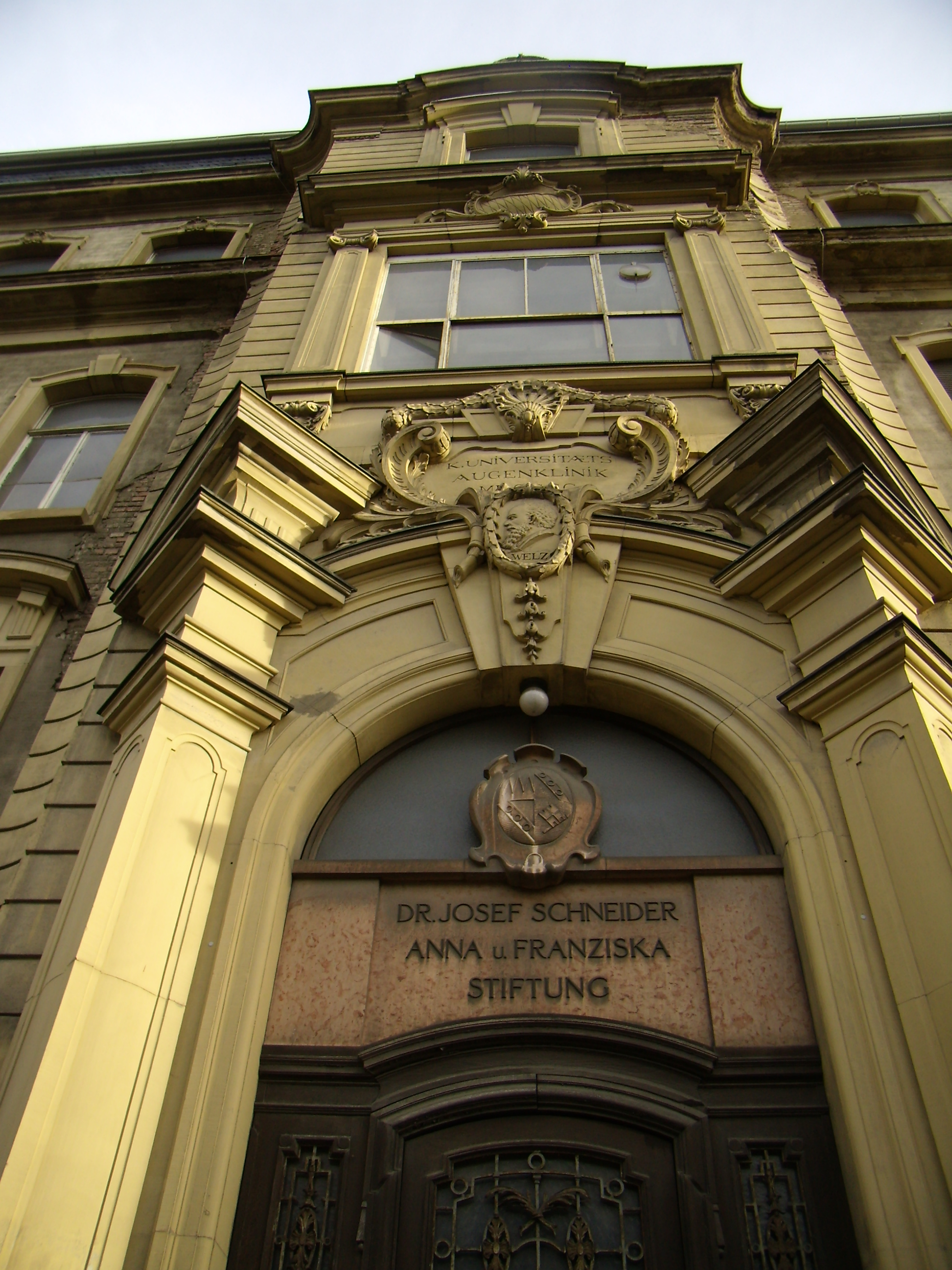 Würzburg - Röntgenring 12 Detail